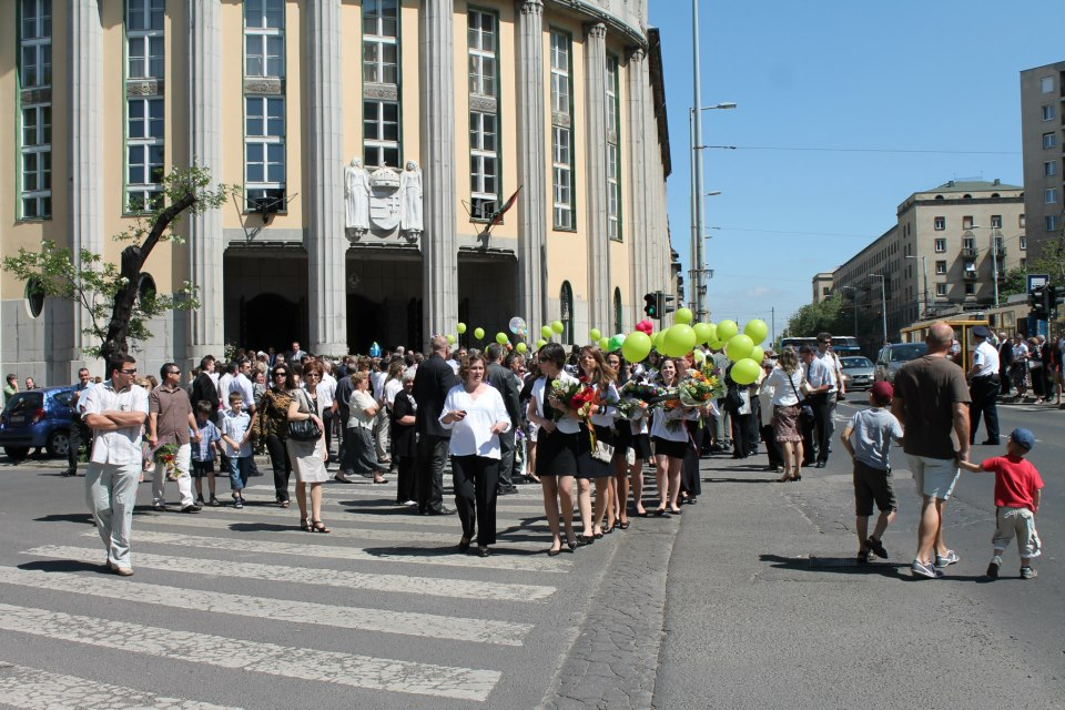 Ballagási menet a budapesti Szent László Gimnázium előtt